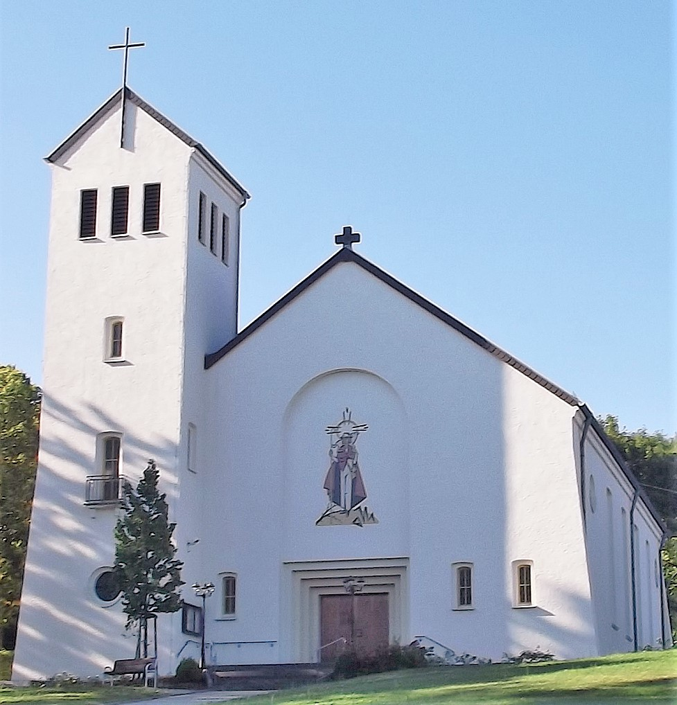 Exterior of the roman catholic church in Aschbach, Saarland